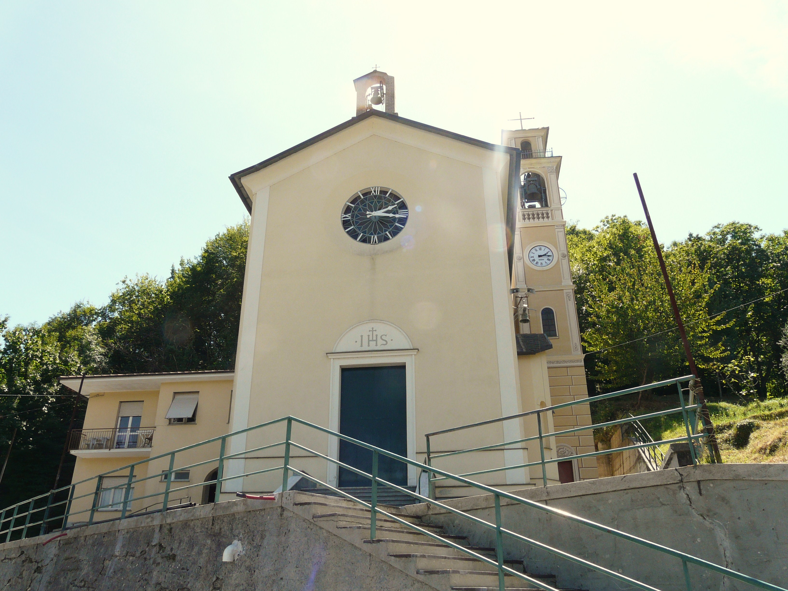 Chiesa del Cristo Re e Maria Santissima Immacolata, Cassanesi, Tribogna, Liguria, Italia